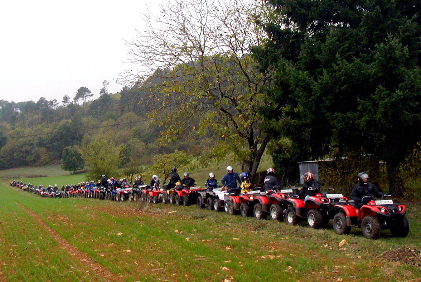 Randonnée découverte Quad Evasion 47 du Haut-Agenais Périgord Quercy sur les sentiers du cèpe